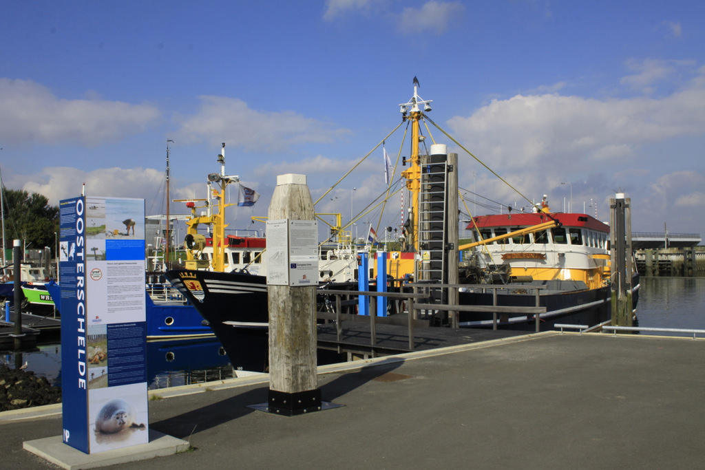 Haven van Bruinisse aan het Natuurgebied de Ooosterschelde.